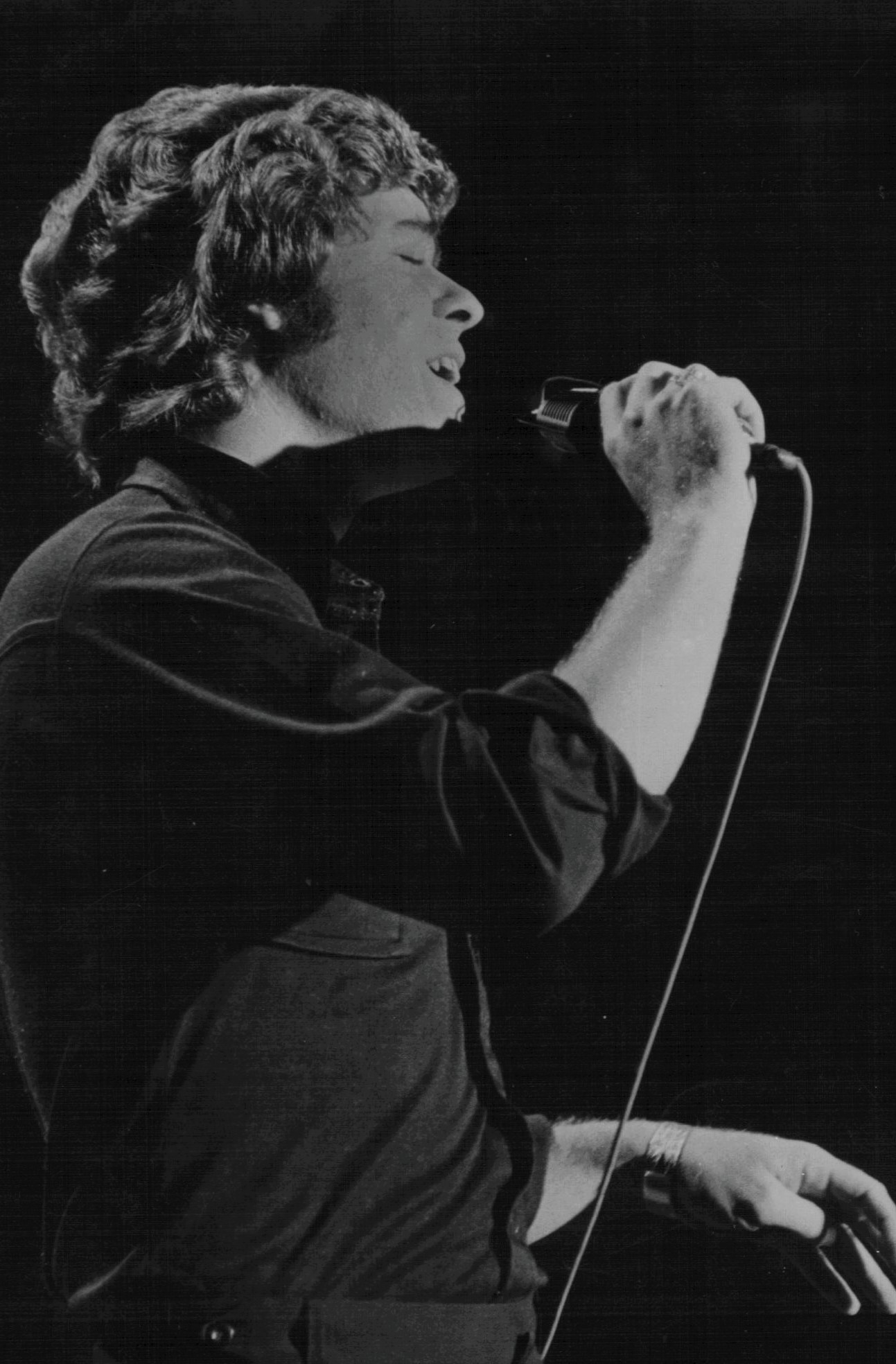 Marcelo Hernández, cantante chileno en los años 1970.